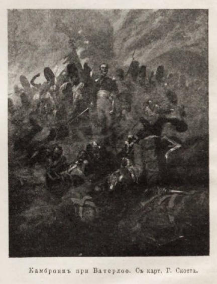 Данное изображение было использовано в статье «Камбронн, Пьер-Жак-Этьен, барон» опубликованной во двенадцатом томе «Военной энциклопедии», который был издан книгоиздательским товариществом Ивана Дмитриевича Сытина в 1913 году в столице Российской империи городе Санкт-Петербурге.